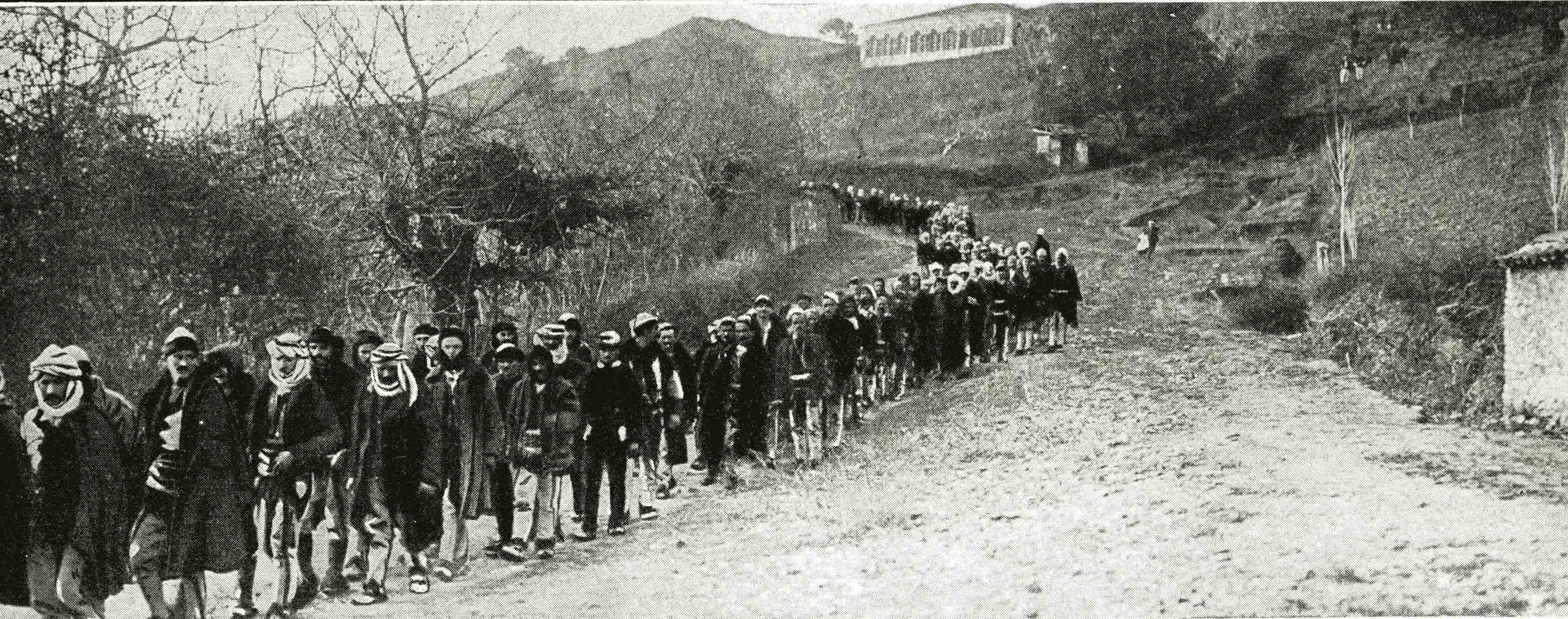 "Les Malissores viennent faire leur soumission". Après avoir remis leurs armes, ils se rendent à Durazzo, résidence provisoire d'Essad Pacha.